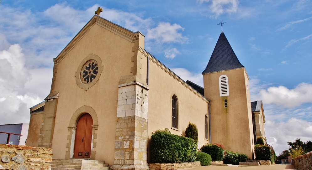 église Ste Foy